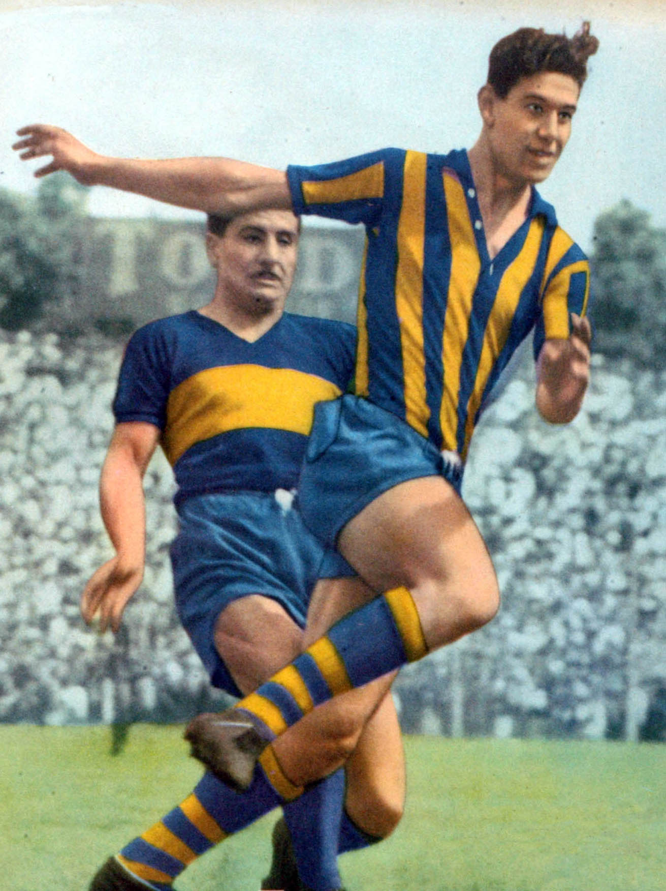 Oscar Massei y Eliseo Víctor Mouriño en la tapa de la revista El Gráfico.